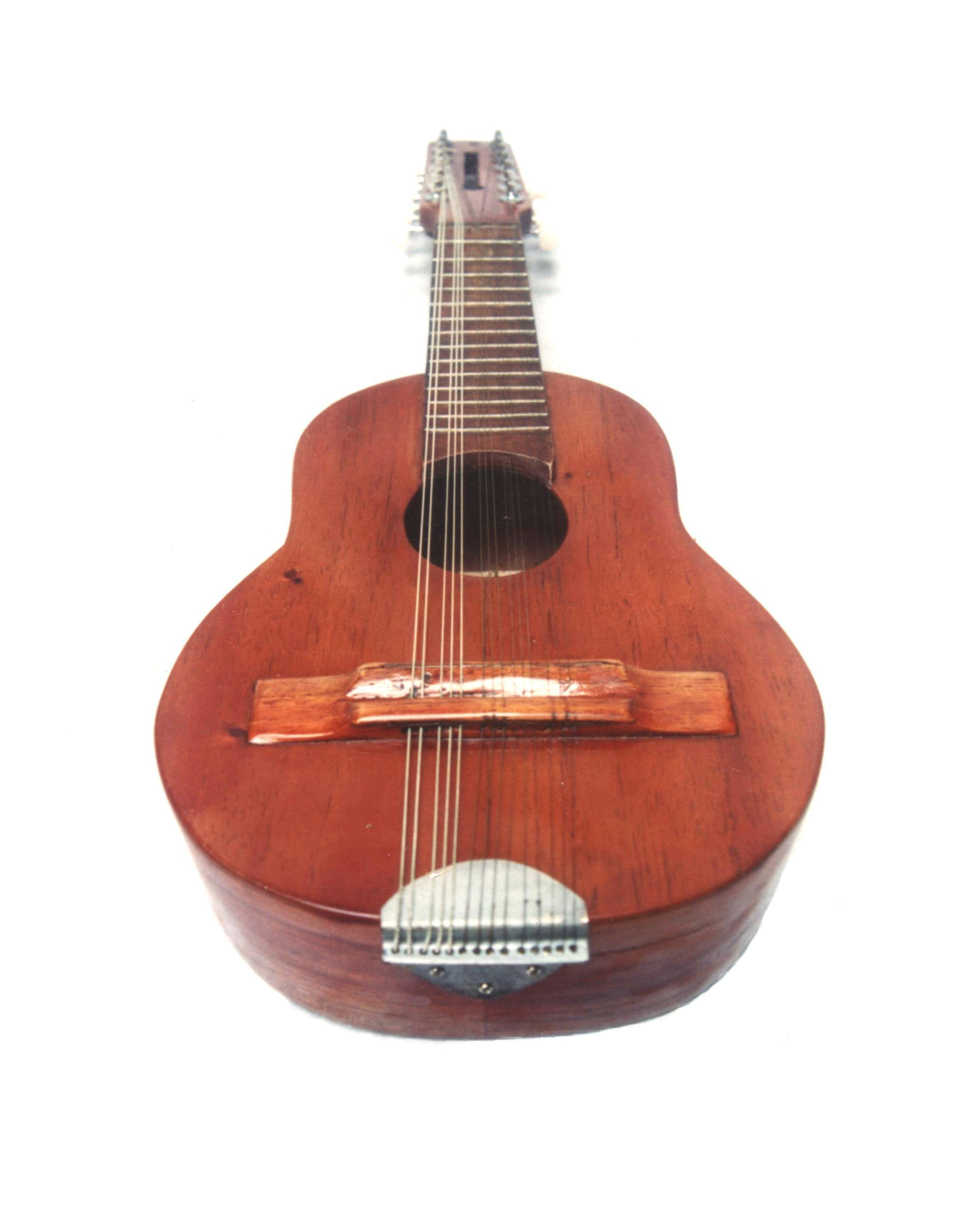 Bandolin fabricado por el Reconocido Luthier Cayetano Martinez